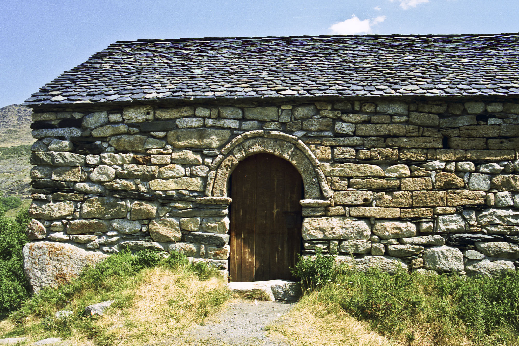 Chapelle Sant Quirc de Taüll (Vall de Boí), Alta Ribagorça, Espagne